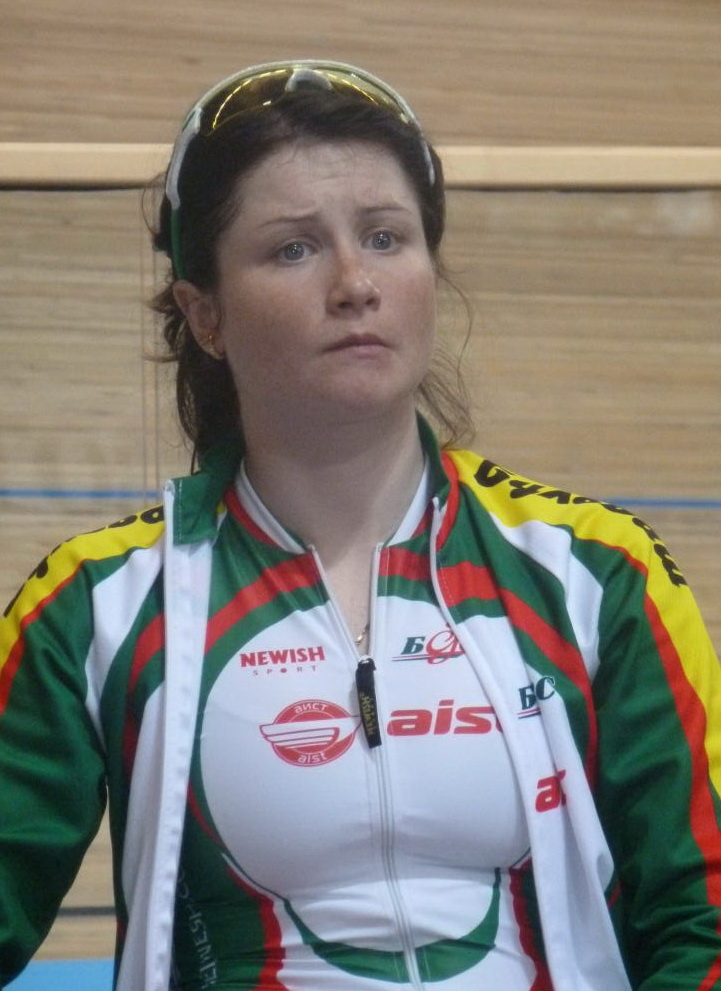 Aksana Papko, weißrussische Radrenfahrerin